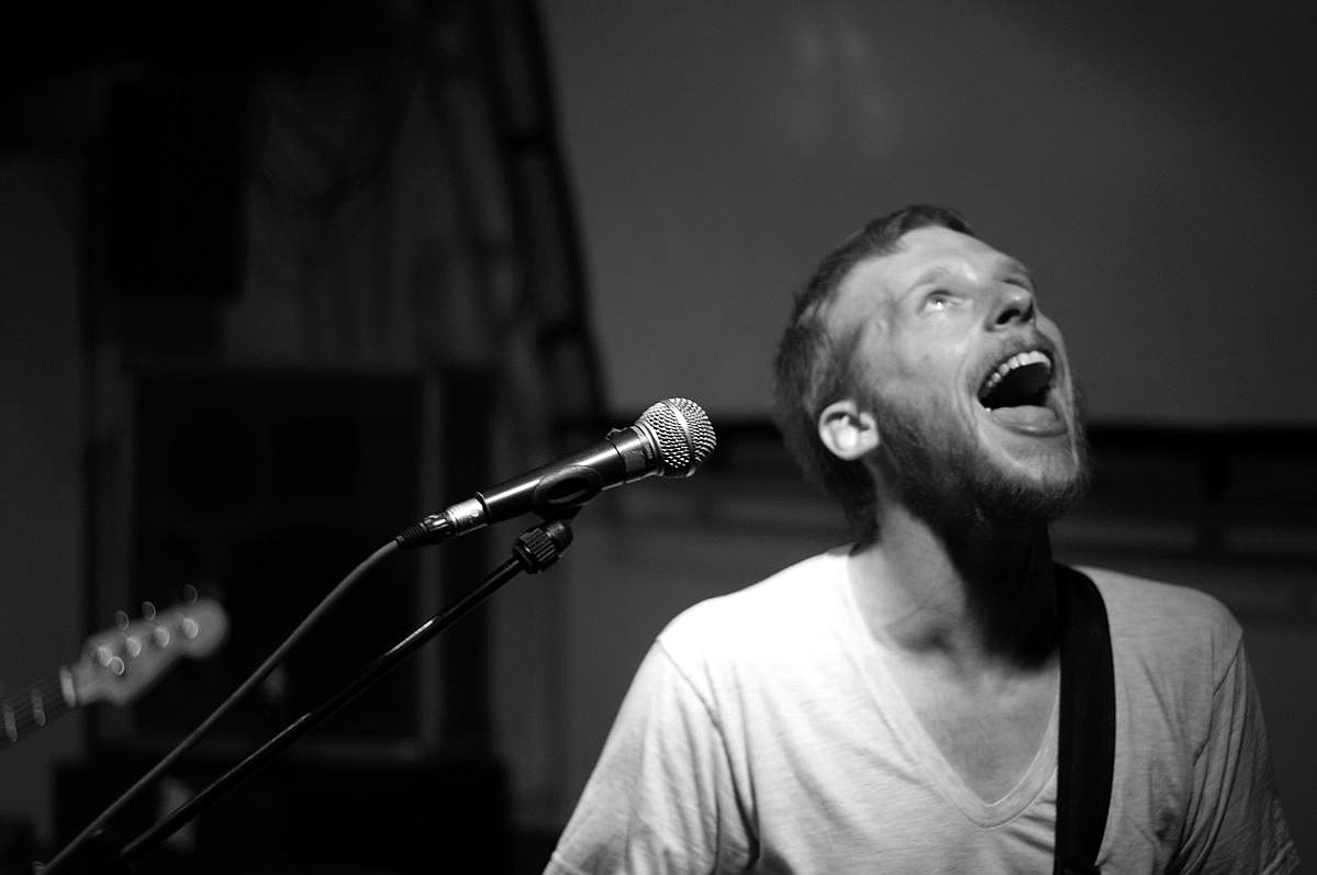 Kevin Devine playing in De Nieuwe Anita (Amsterdam), 9th of May, 2008